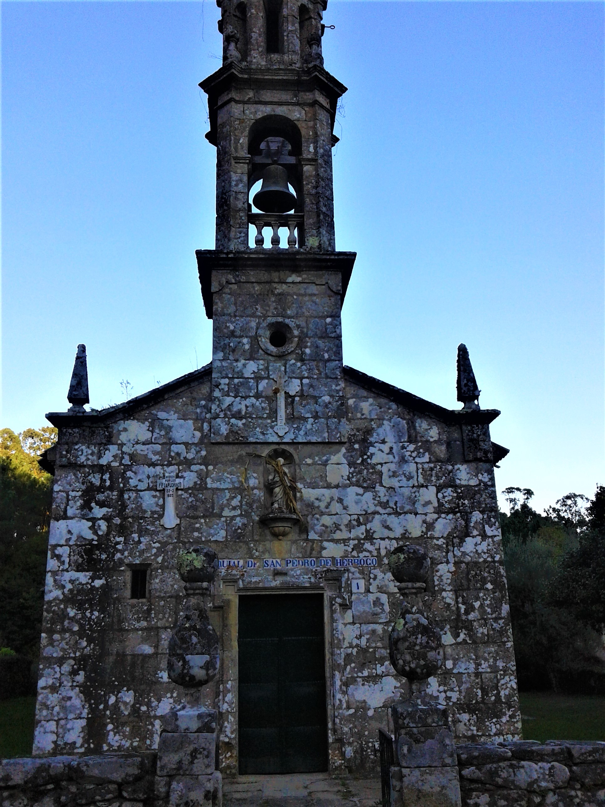 De planta de cruz latina